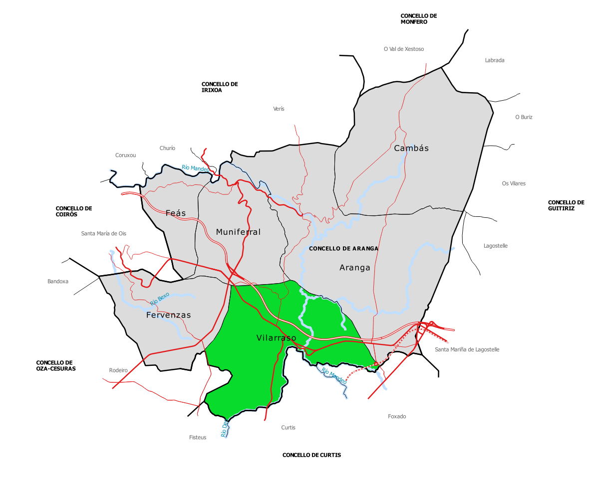 Mapa da parroquia de Vilarraso no concello de Aranga (Galiza).